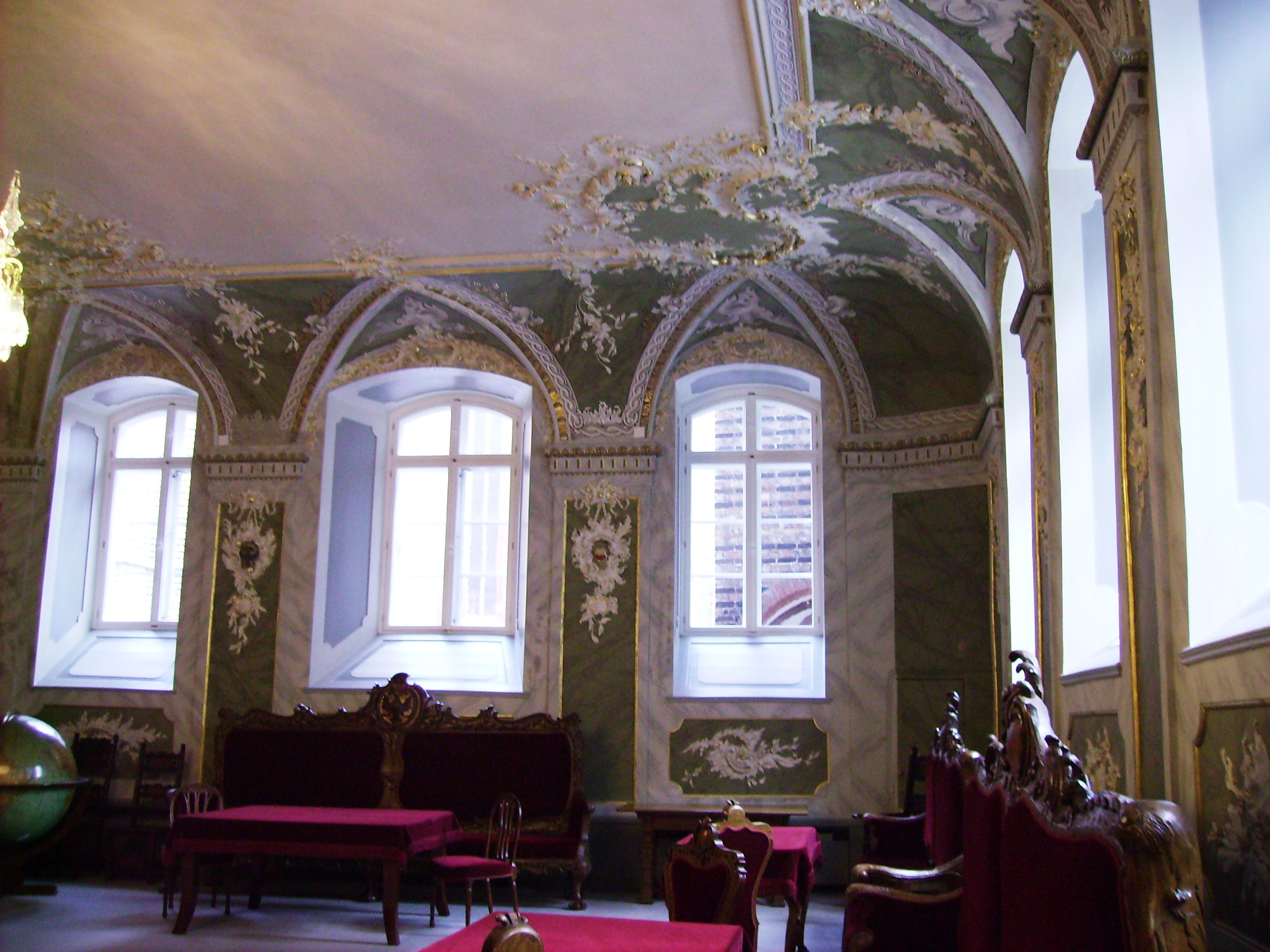 Audienzsaal des Rathauses in Lübeck (Ausschnitt)